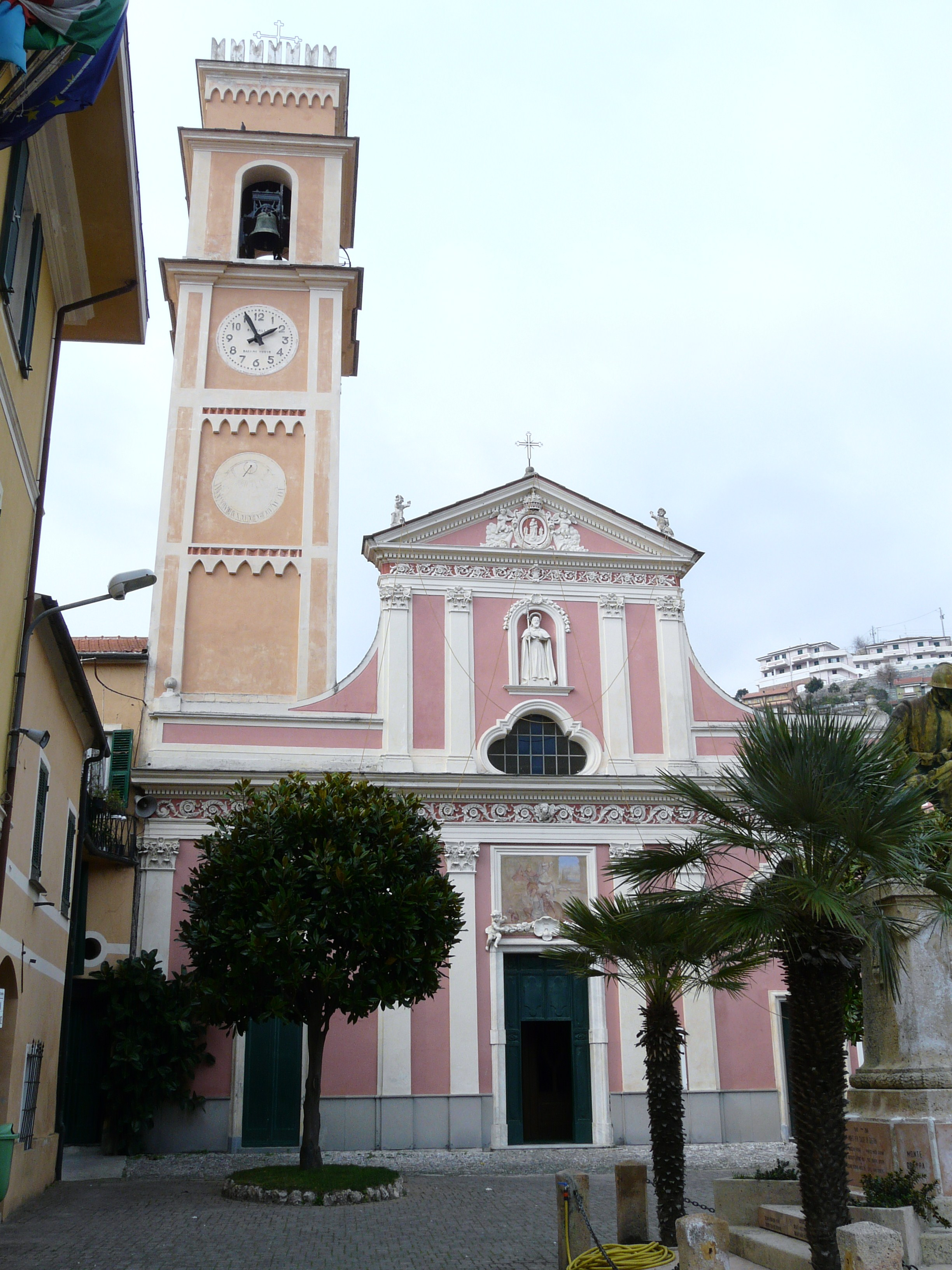 Chiesa di San Giacomo, Tovo San Giacomo, Liguria, Italia